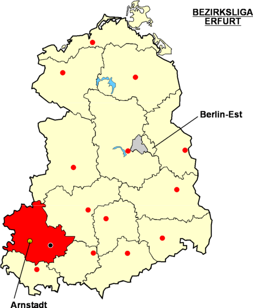 Localisation de Arnstadt dans la "Bezriksliga Erfurt" Catégorie:Logo de clubs de football - Allemagne